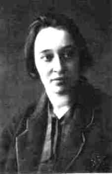 Надежда Яковлевна Мандельштам, жена поэта Осипа Мандельштама, мемуаристка